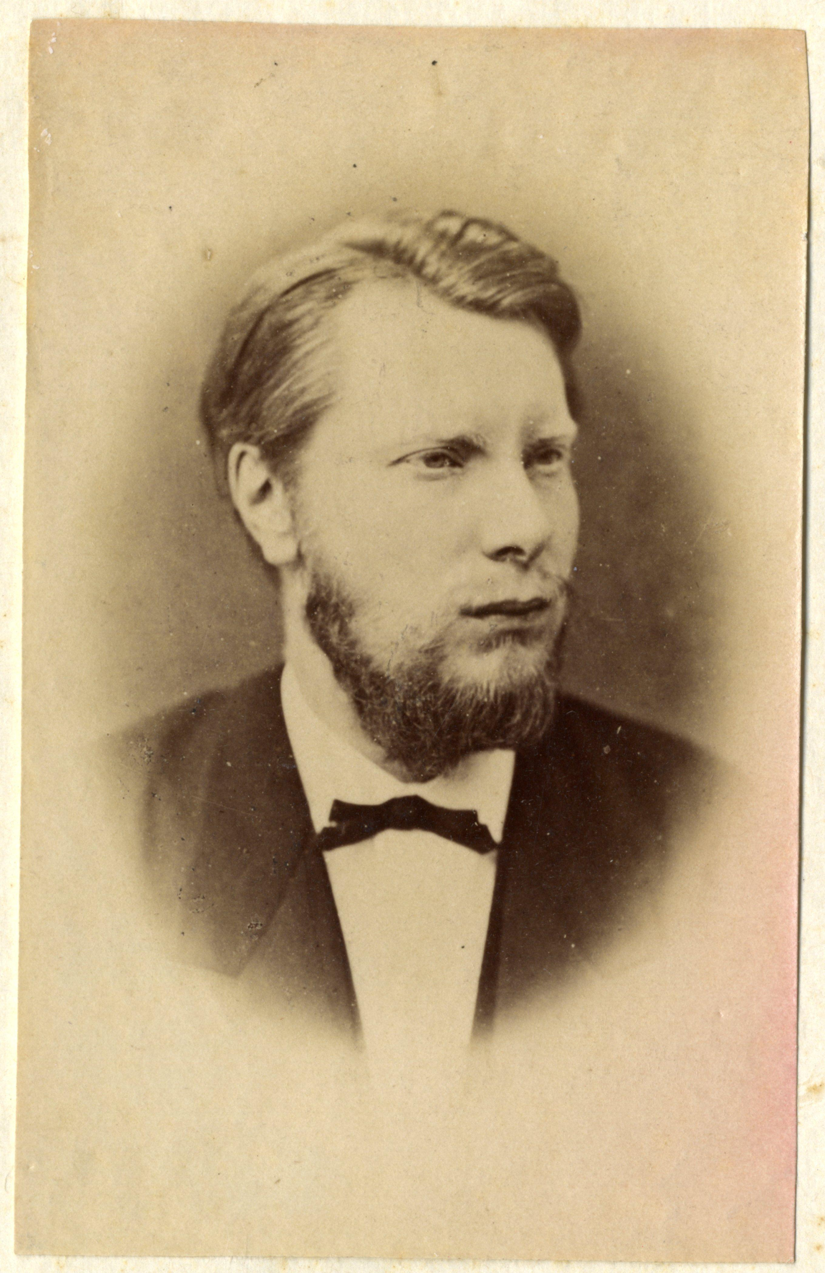 Alexander (Willem Alexander Carel Hendrik Frederik) (1851-1884), prins van Oranje, prins der Nederlanden, prins van Oranje-Nassau